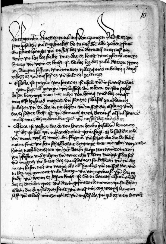 Dies ist eine Seite des Codex germanicus monacensis 415, der sich in der Bayerischen Staatsbibliothek in München befindet. Hier werden Kochrezepte aus dem Mittelalter beschrieben.